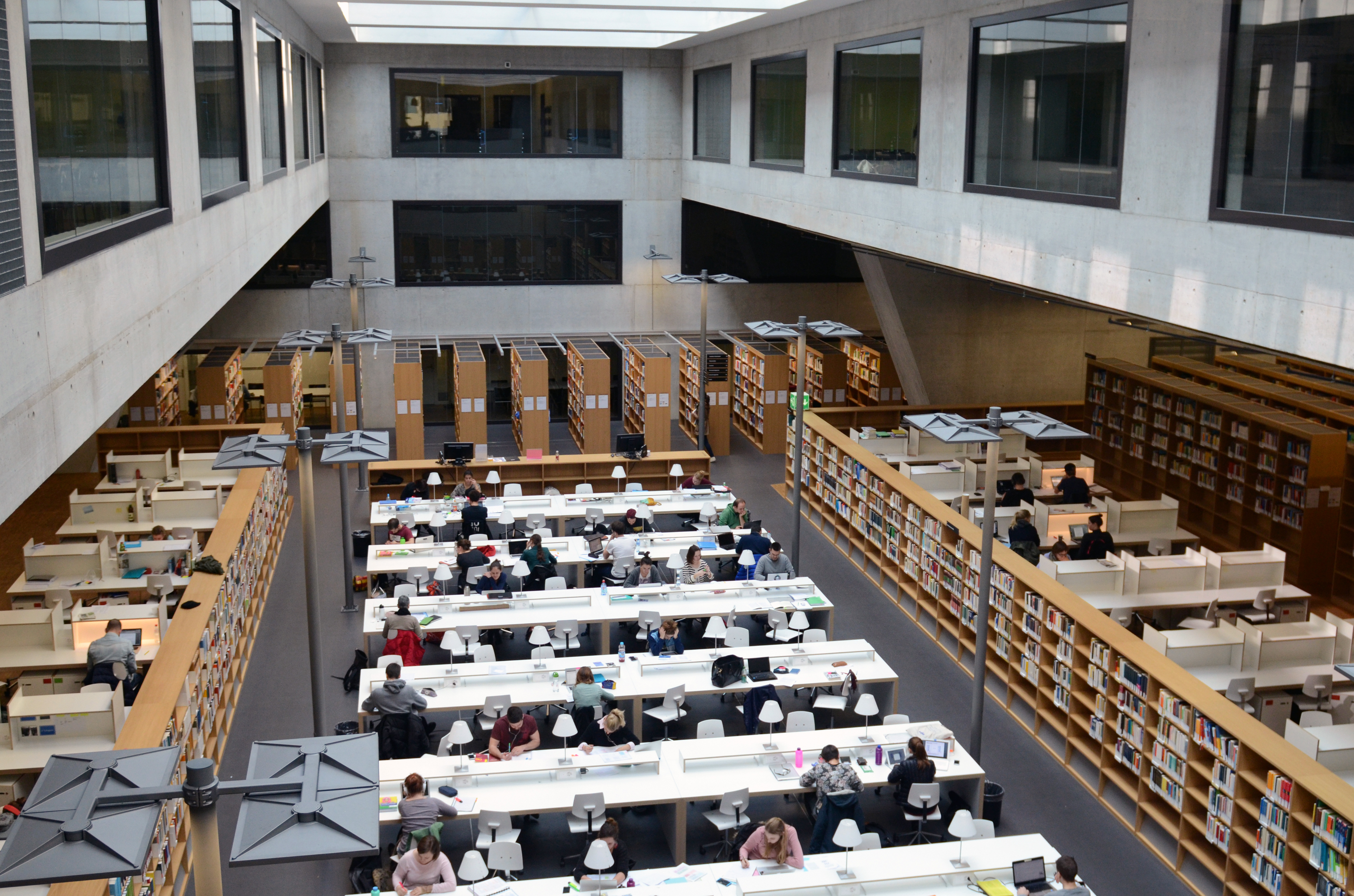 Die Bibliothek der Universität Bern und der Pädagogische Hochschule Bern, kurz PHBern im Hochschulzentrum vonRoll, Fabrikstrasse 8, Bern.